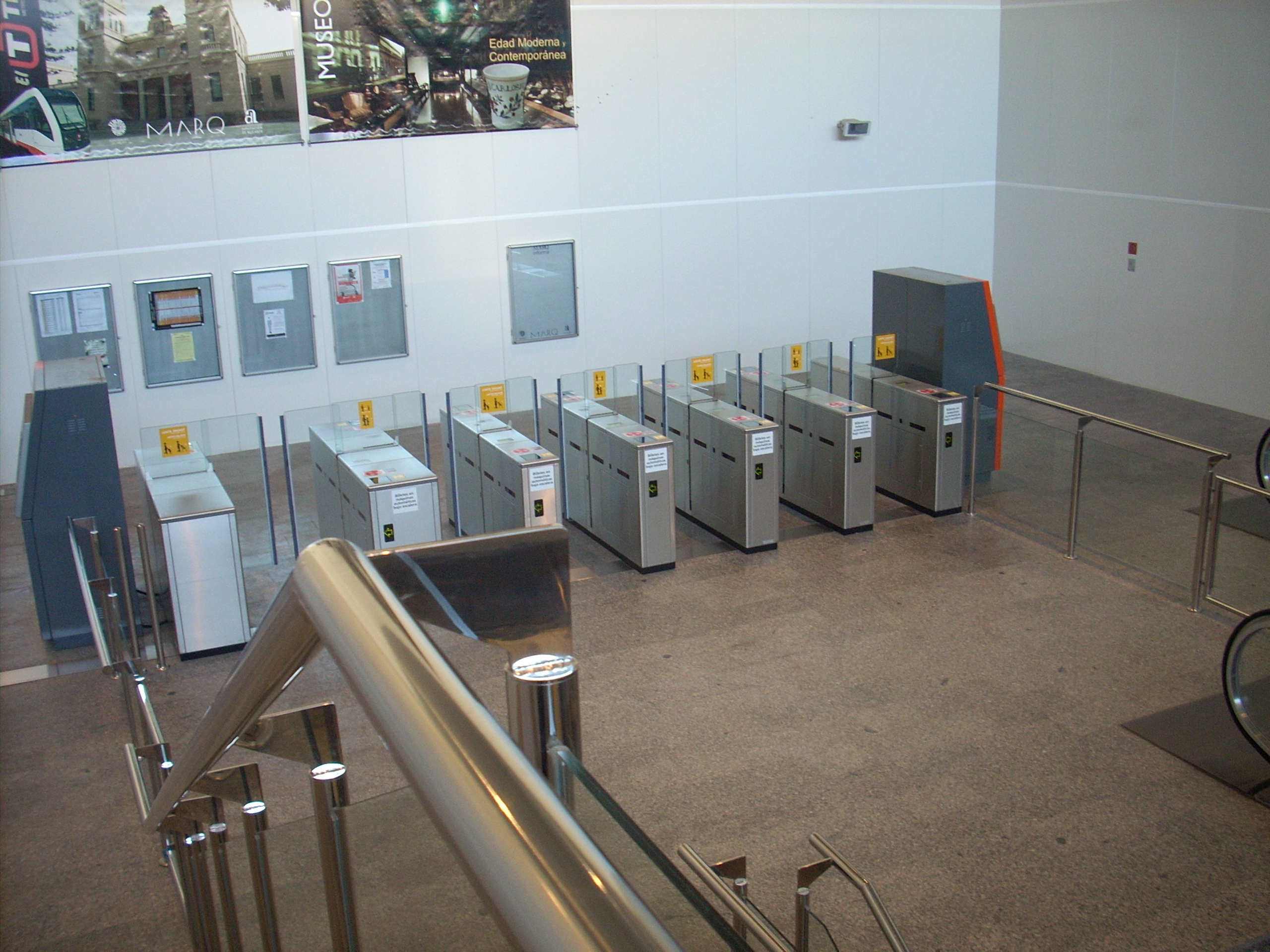 Puertas automaticas y maquinas expendedoras de billetes en el acceso a MARQ desde la plaza del Doctor Mas Magro.